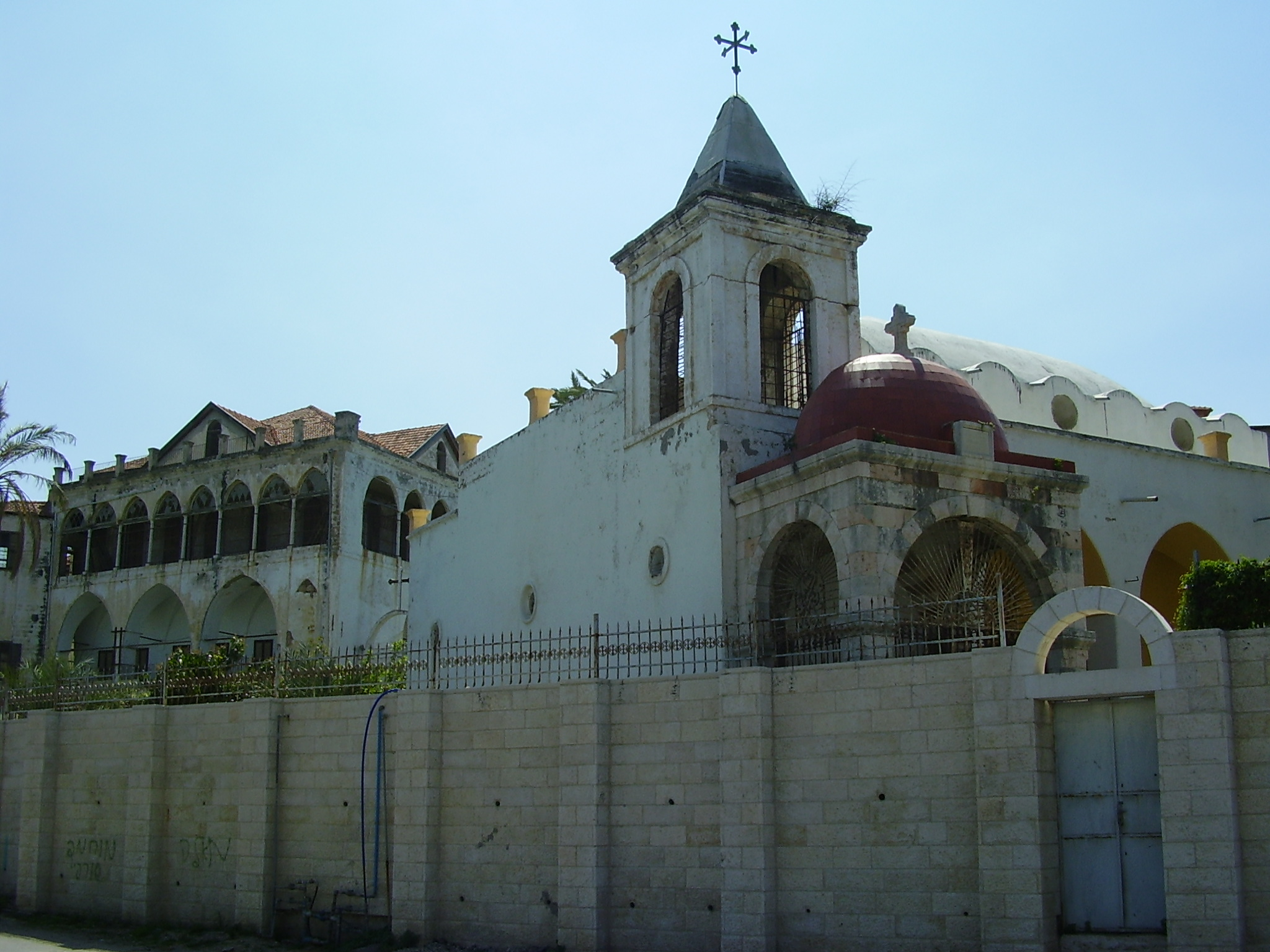 הכנסייה והאכסניה הקופטית ביפו